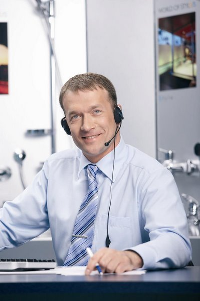 Reklaam